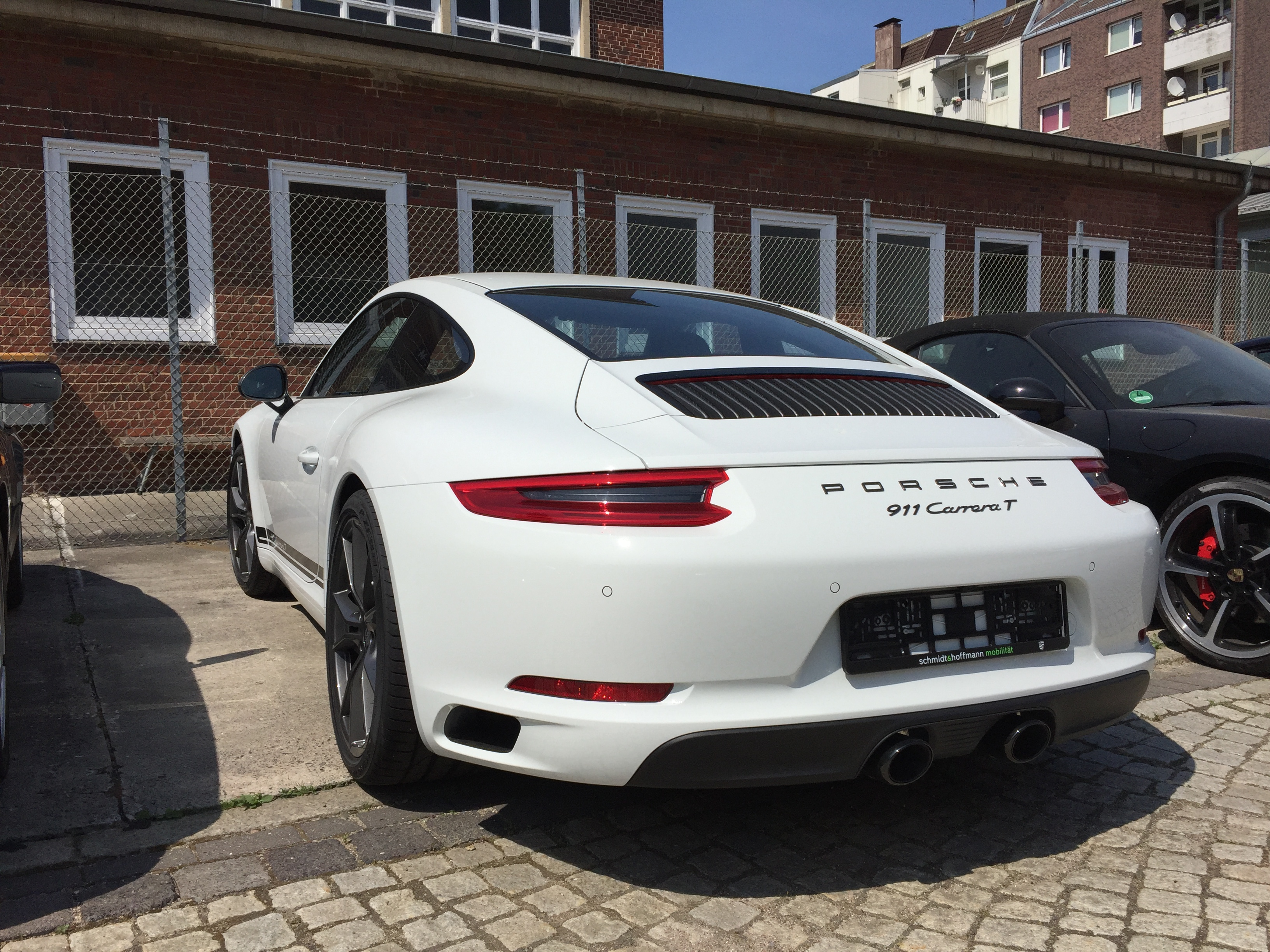 Porsche 911 (991) Carrera T